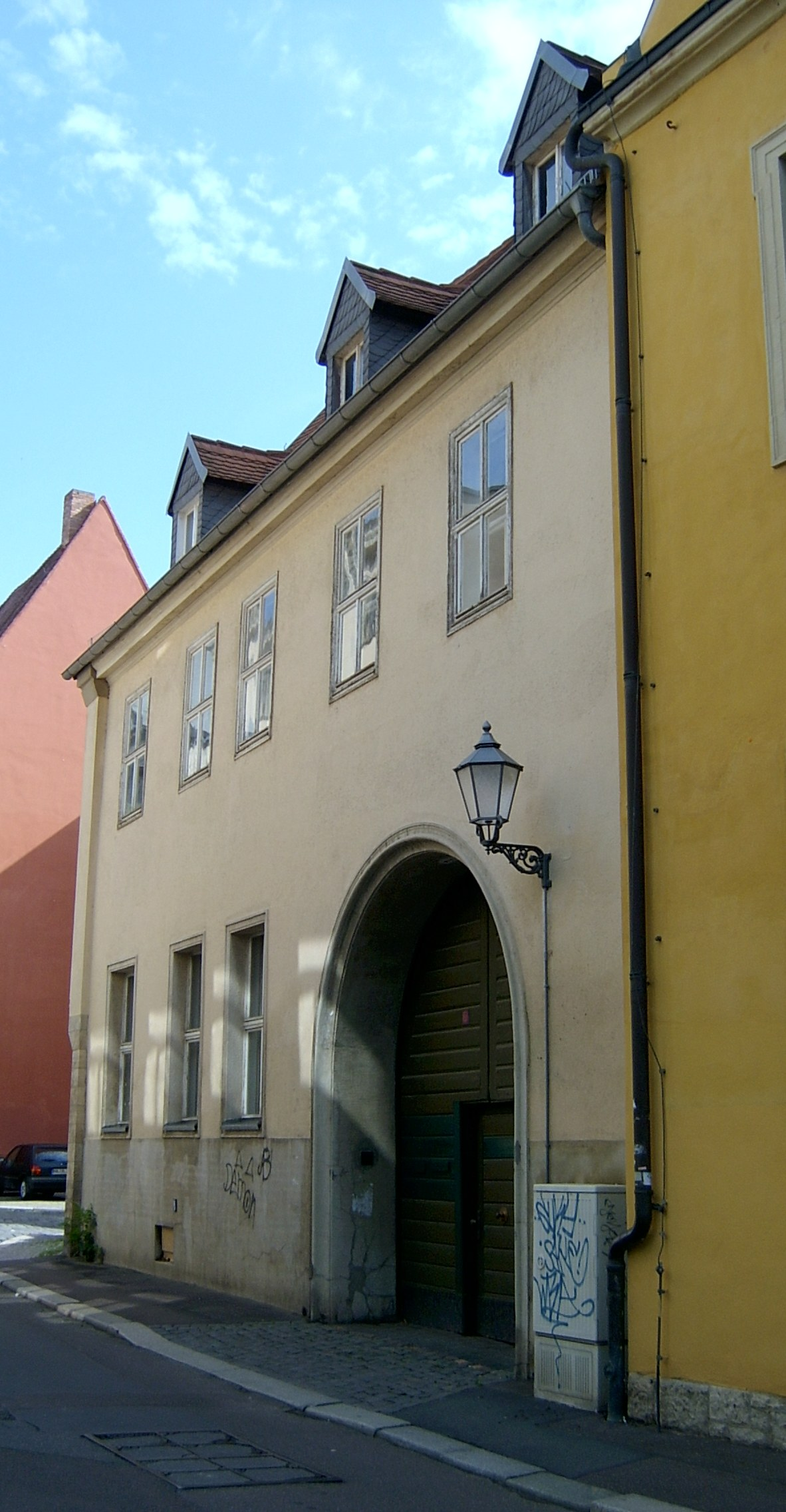 Die Große Märkerstraße 9 in Halle (Saale)